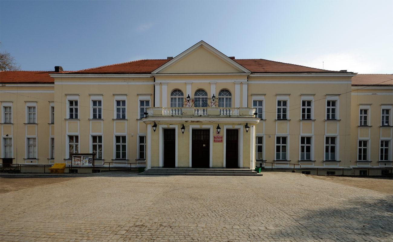 Pałac von Hoymów, obecnie siedziba Urzędu Miasta.